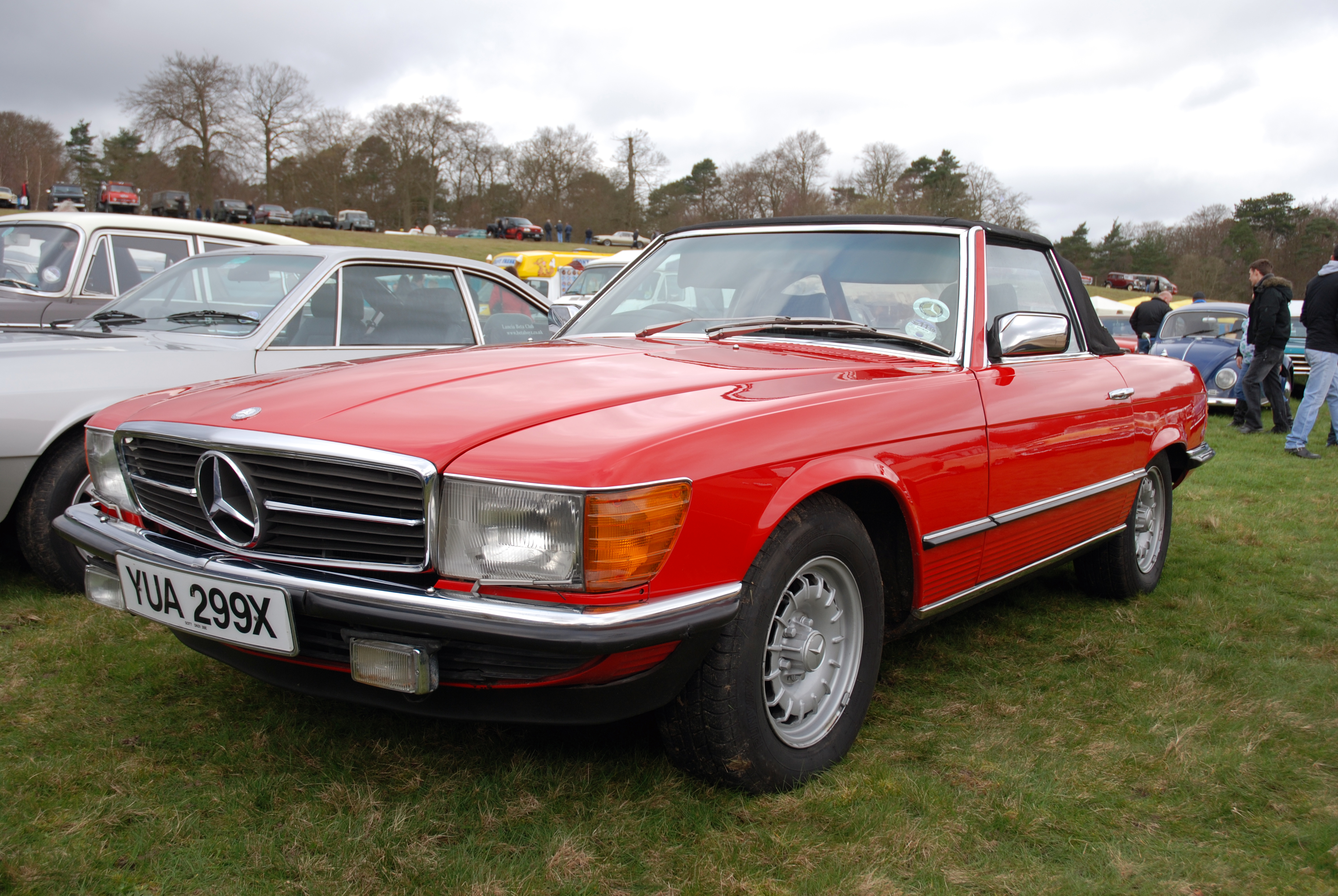 Wheels Day 2010